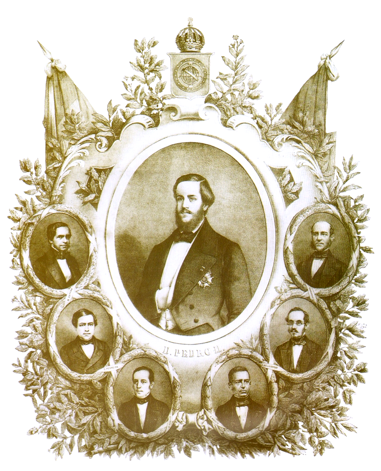 Dom Pedro II e o gabinete da Conciliação de 1853 (Emperor Pedro II of Brazil and the 1853-56 "Conciliation cabinet")